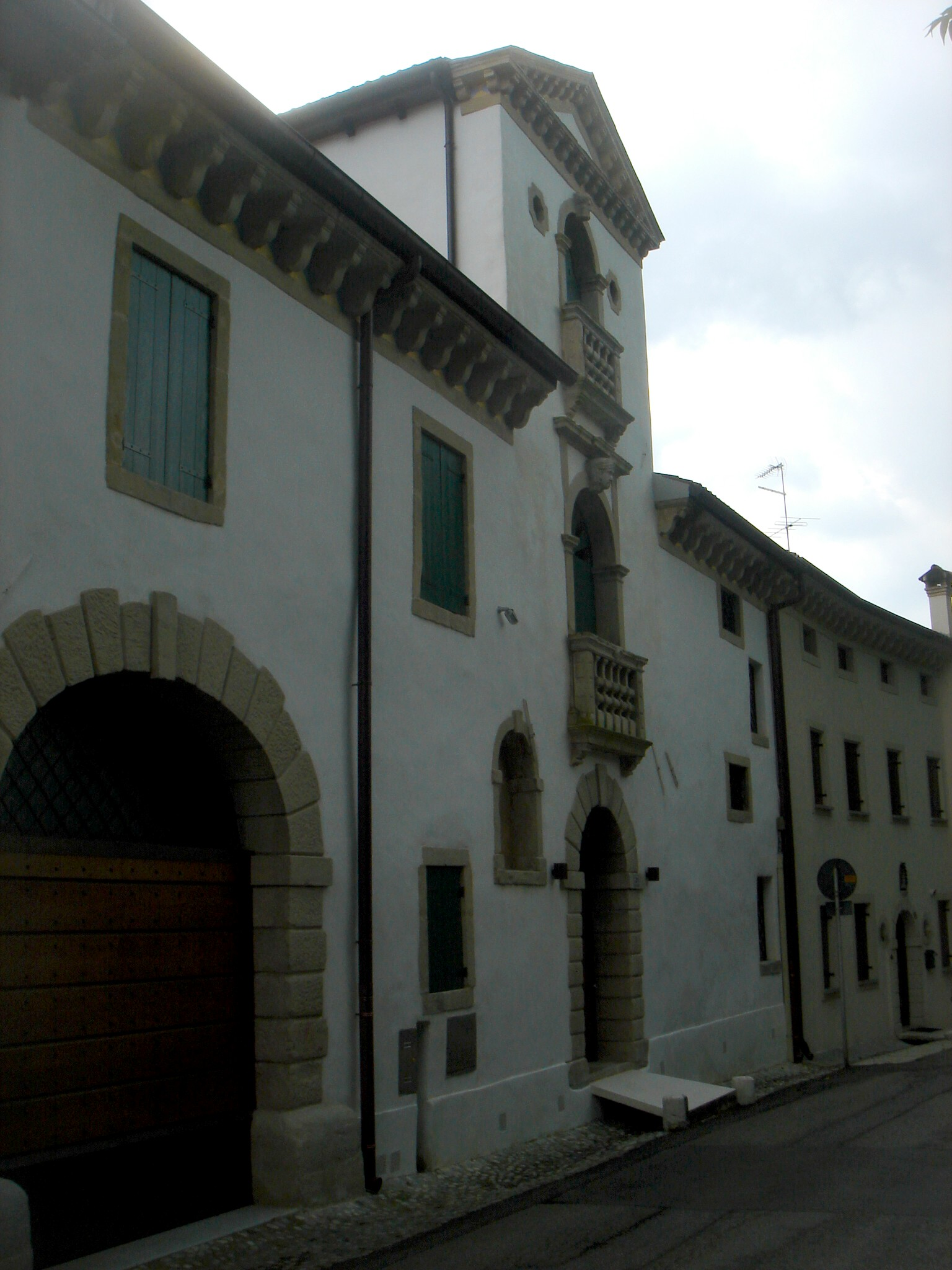 San Fior (Treviso, Italia): Borgo Canè, edificio centrale timpanato, con nicchia affrescata.